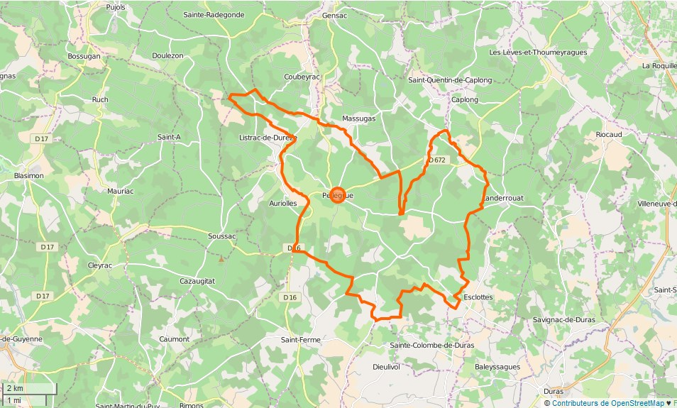 Pellegrue Limite communale This map may be incomplete, and may contain errors. Don't rely solely on it for navigation.